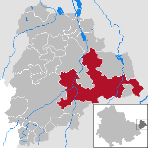 Nobitz in Thuringia - District Altenburger Land